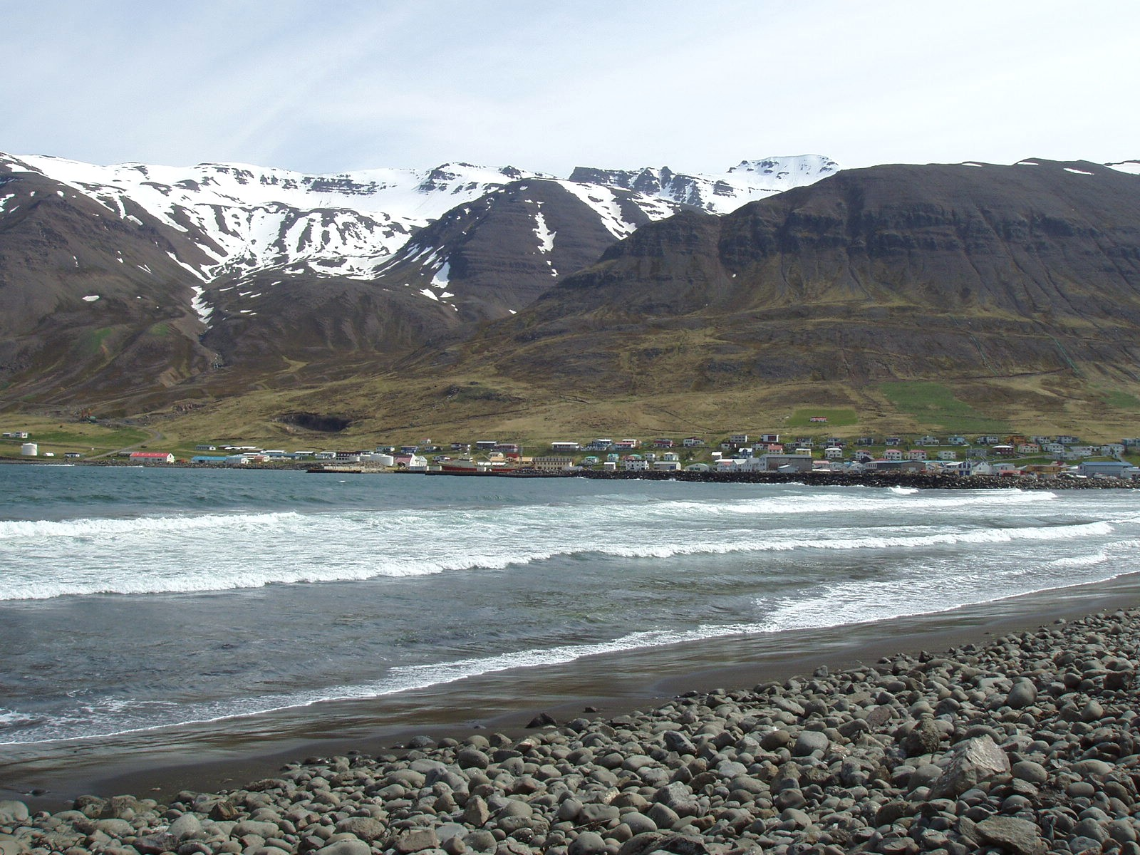 Ólafsfjörður